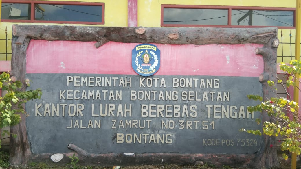 Kantor Kelurahan Berebas Tengah